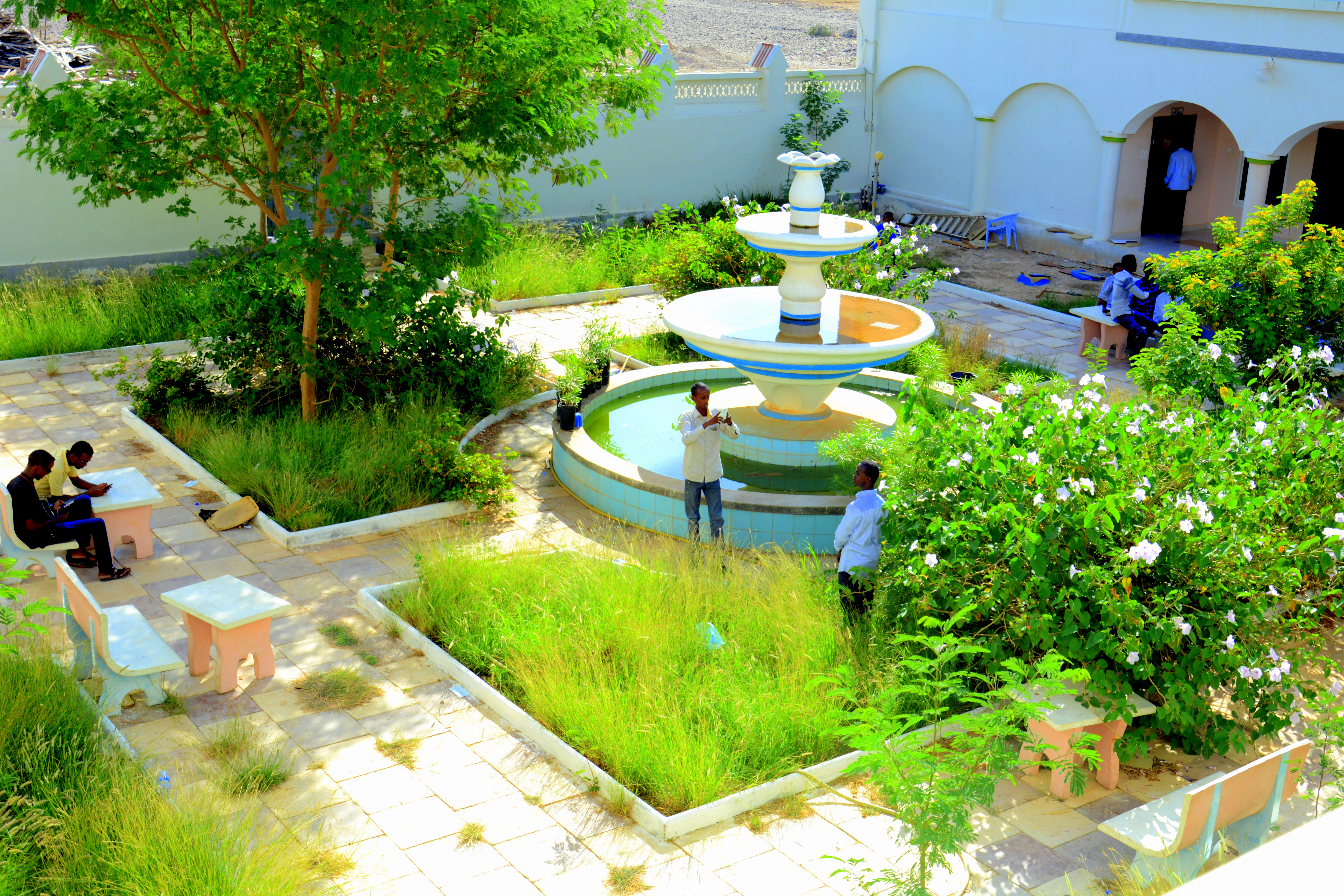 East africa university bosaso Head quater